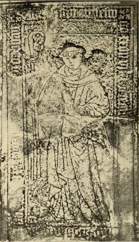 Retouchiertes Lichtbild der aus Fragmenten rekonstuierten Grabplatte des Abtes Hermann Bokholt im Doberaner Münster von 1853